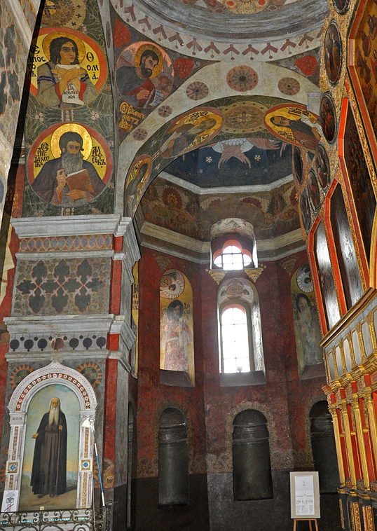 Інтер'єр церкви Всіх Святих Києво-Печерської лаври